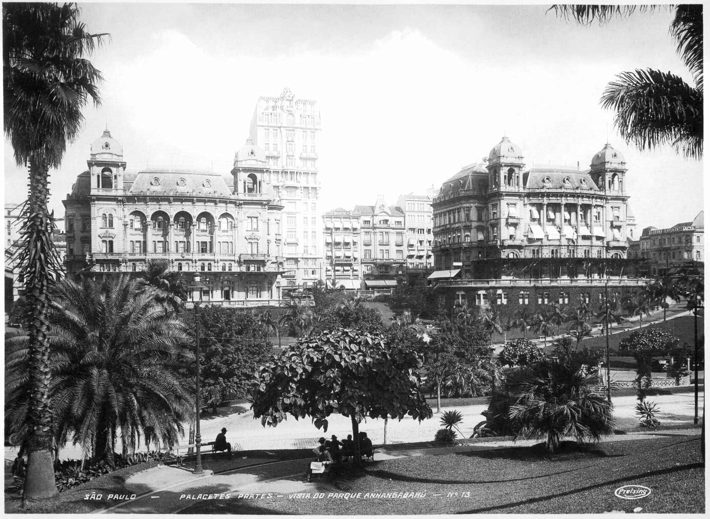 Vista do Vale do Anhangabaú, com os Palacetes Prates e o Edifício Sampaio Moreira (São Paulo, Brasil)